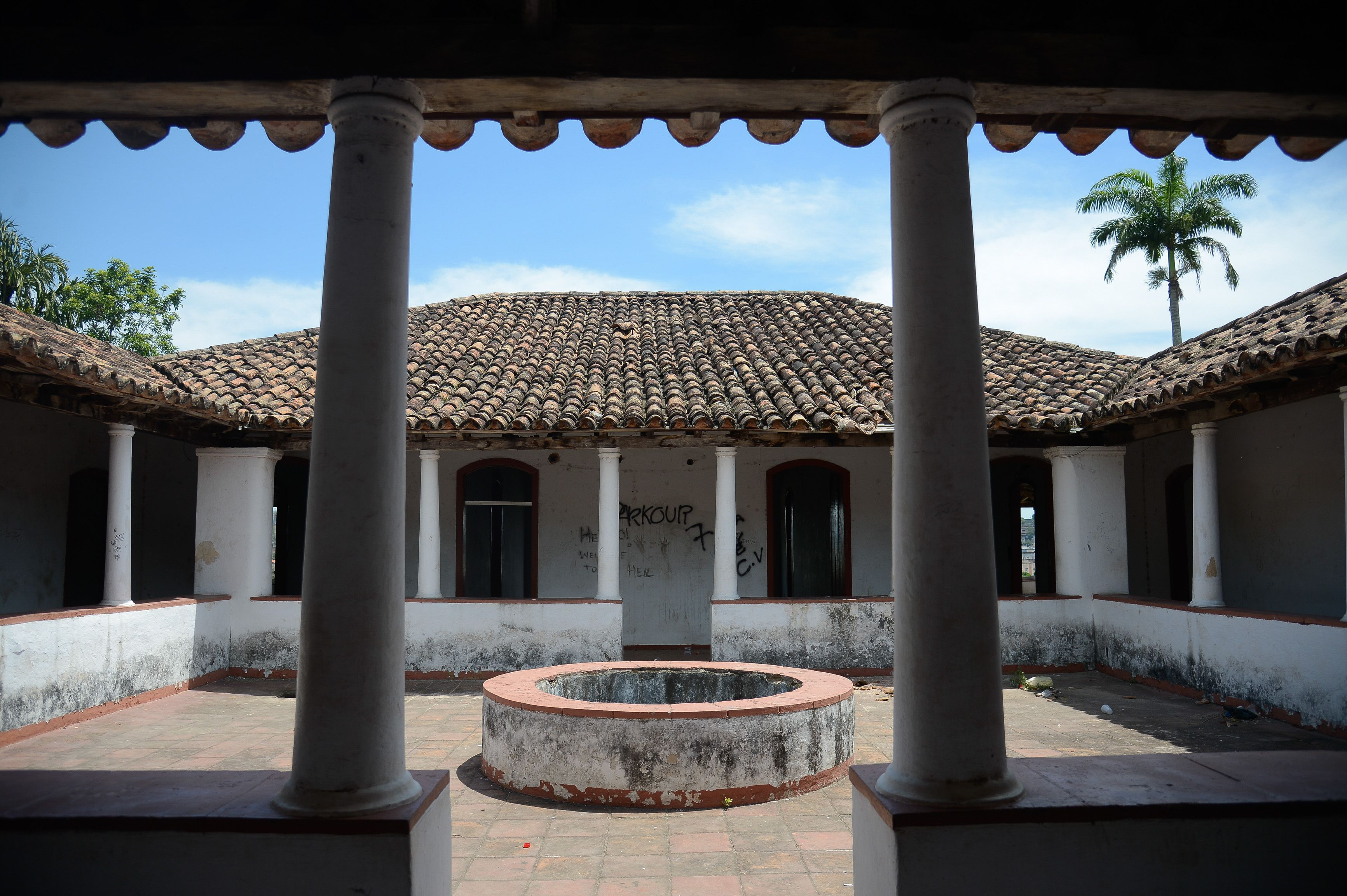 São Gonçalo (RJ) - Marco da arquitetura colonial brasileira, a Fazenda Colubandê encontra-se degradada. No fim de janeiro, as portas da fazenda foram roubadas e os ladrões desmontaram o retábulo da capela da Sant'Anna, de 1740. Em função disso, a Justiça Federal, a pedido do MPF, determinou que o governo do estado e o Iphan assumam a administração e a recuperação do local.